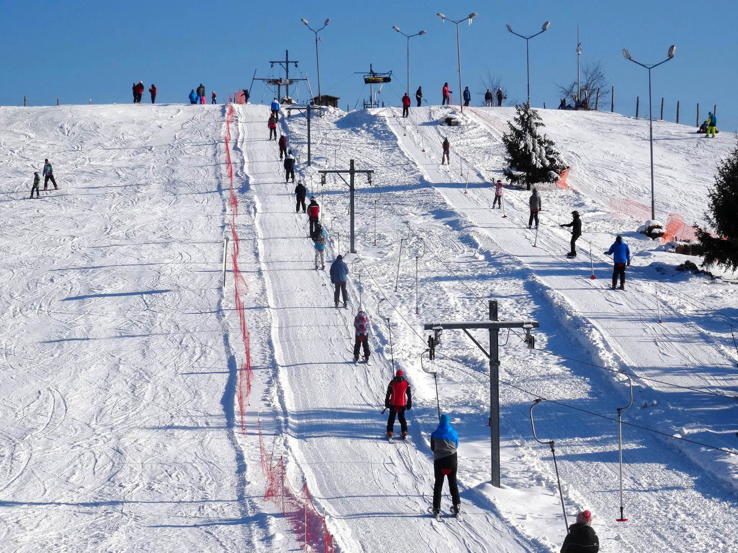 Sztucznie naśnieżany stok narciarski im. Stefana Kulmatyckiego w Bydgoszczy-Myślęcinku